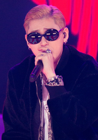 한국어 (조선): 20161119 지코 멜론뮤직어워드